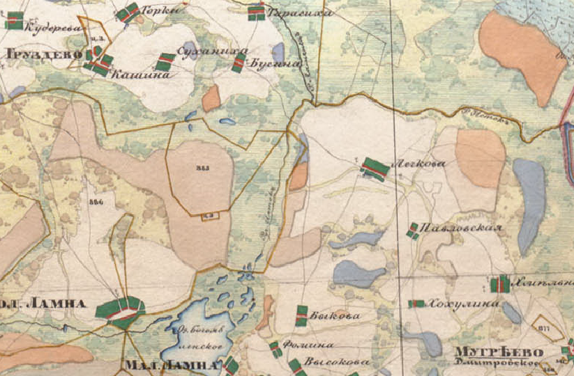 Река Исток на карте Менде 1850-1860. Масштаб: 2 версты в дюйме (1 см-840м, 1:84000).